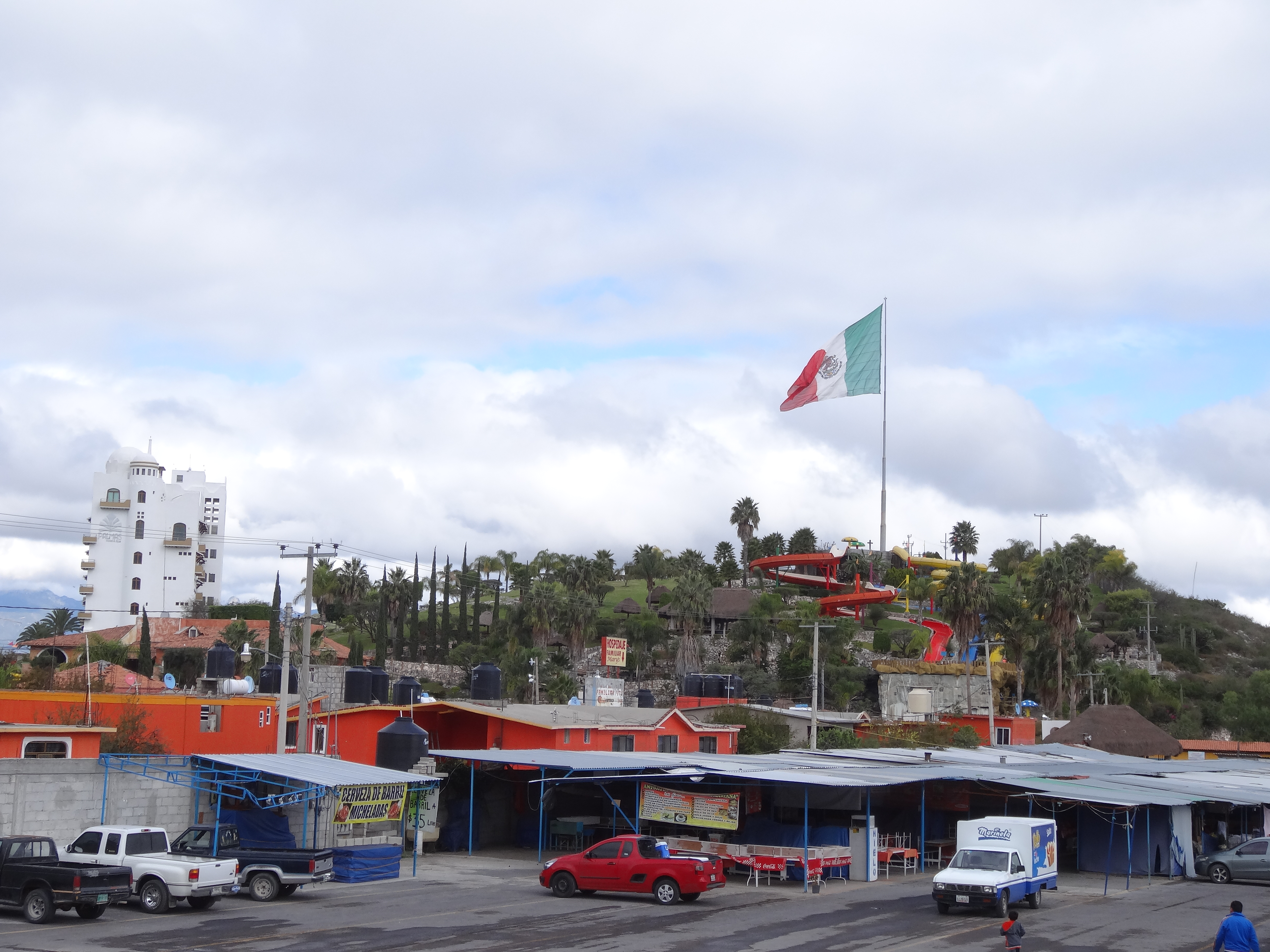 El Tephé Water Park